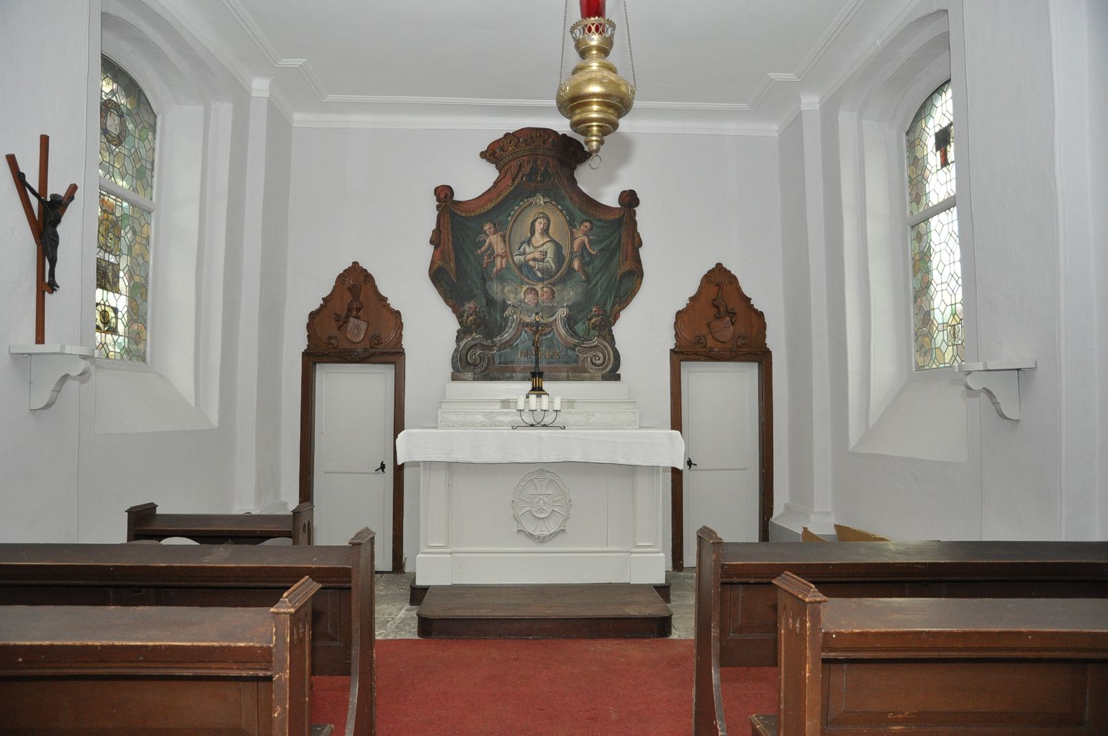 Haus Traar, Kapelle, Innenraum